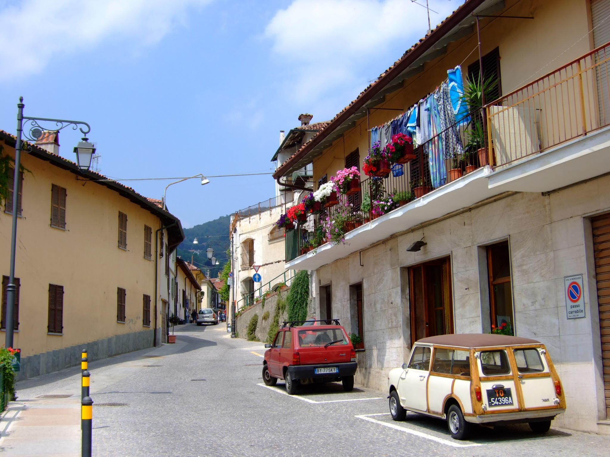 Revigliasco, frazione di Moncalieri